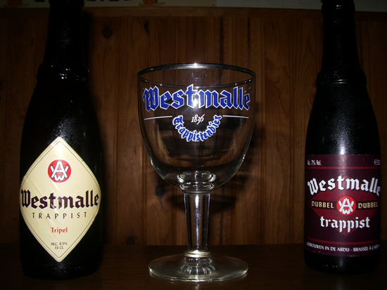 bouteilles des bières westmalle ainsi que leur verre